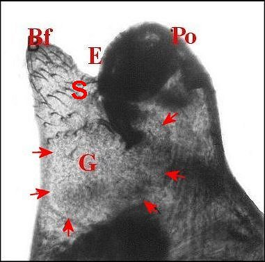 Prosoma éclairci d' Argyrodes argyrodes : glande clypéale vue par transparence.